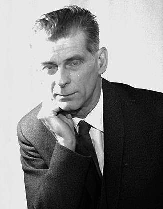 Arkitekt Werner Taesler